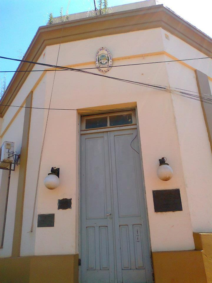 Fachada de ingreso de la Municipalidad de Concepción de la Sierra